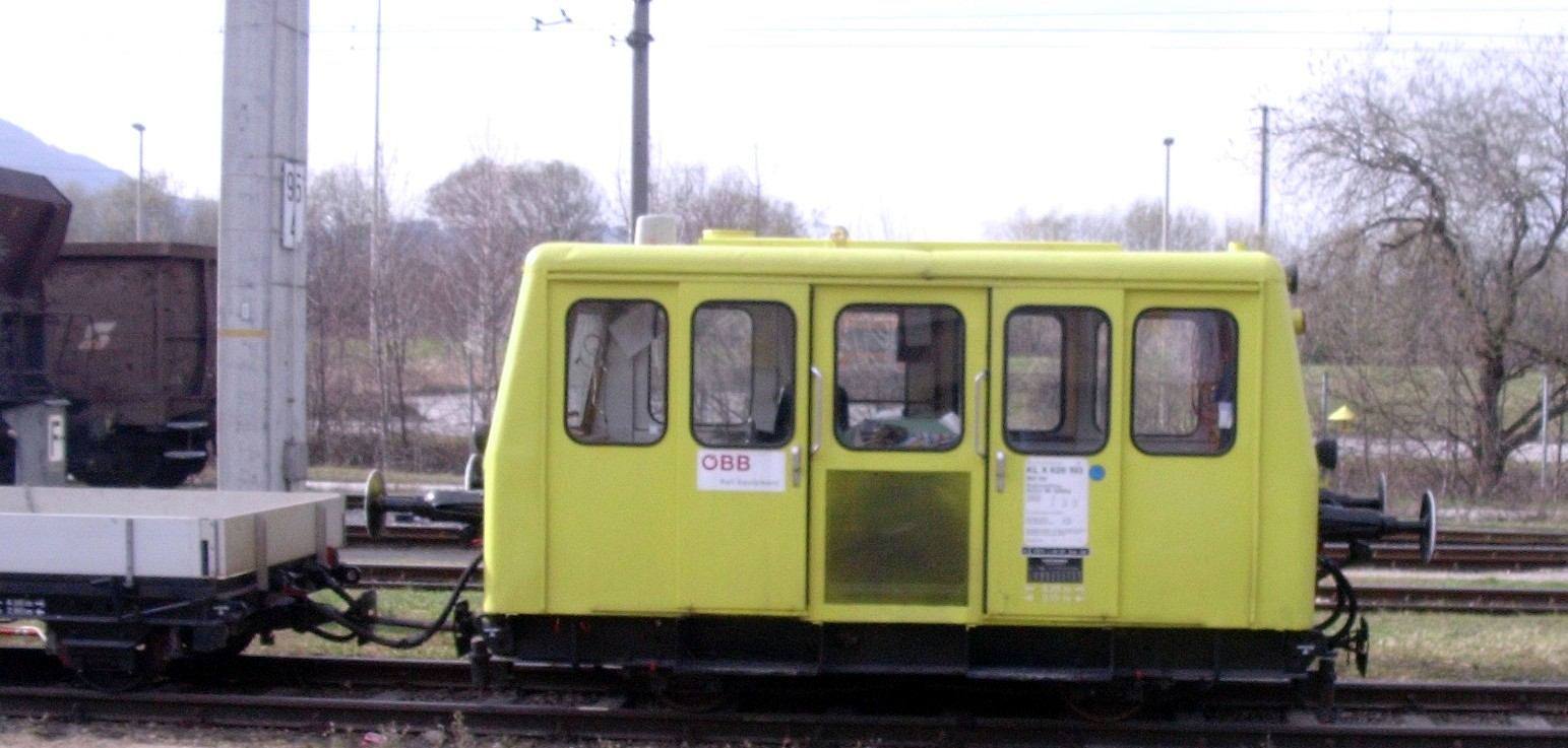 ÖBB X626 - Seitenansicht